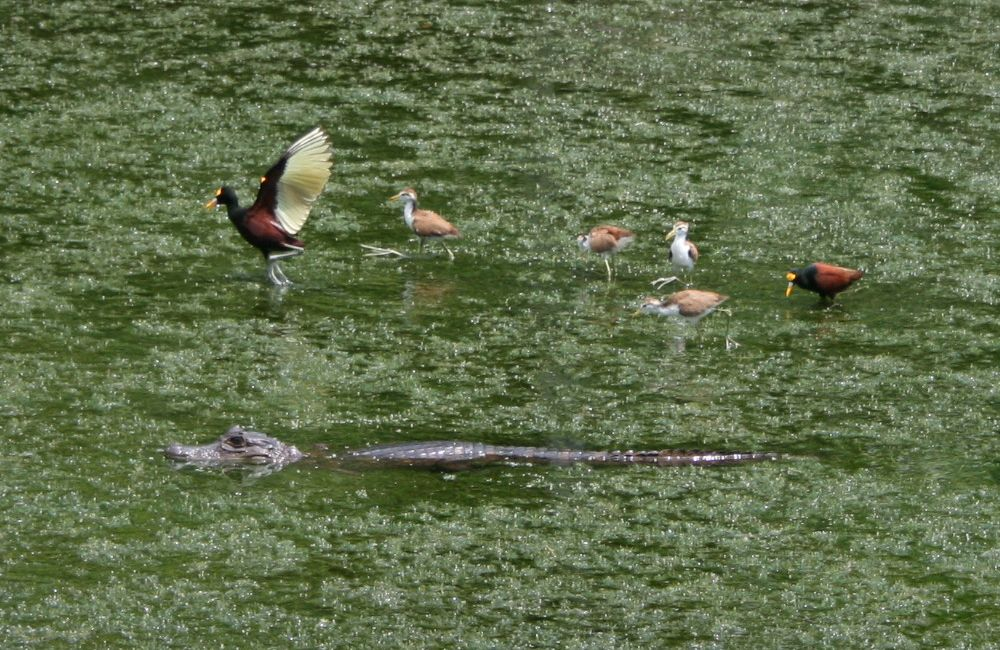 Caiman crocodilus (Alligatoridae), Jacana spinosa (Jacanidae): 2 erwachsene, 4 junge - Costa Rica: Prov. Puntarenas, La Gamba NW Golfito, "Laguna" zwischen "Tropenstation La Gamba"/"Estación Biológica La Gamba" und "Esquinas Rainforest Lodge"